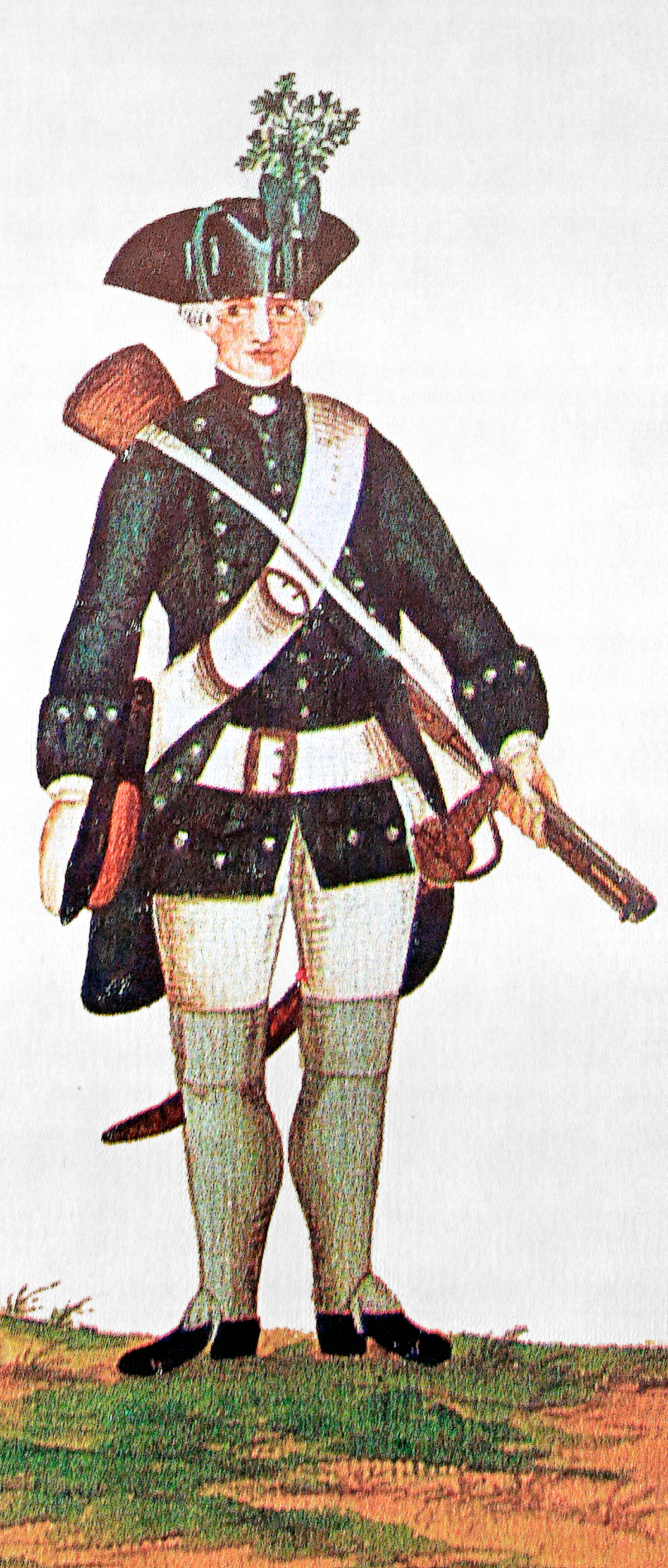 Freytag'sche Jäger Gmundener Prachtwerk der kurhannoverschen Armee während des Siebenjährigen Krieges.